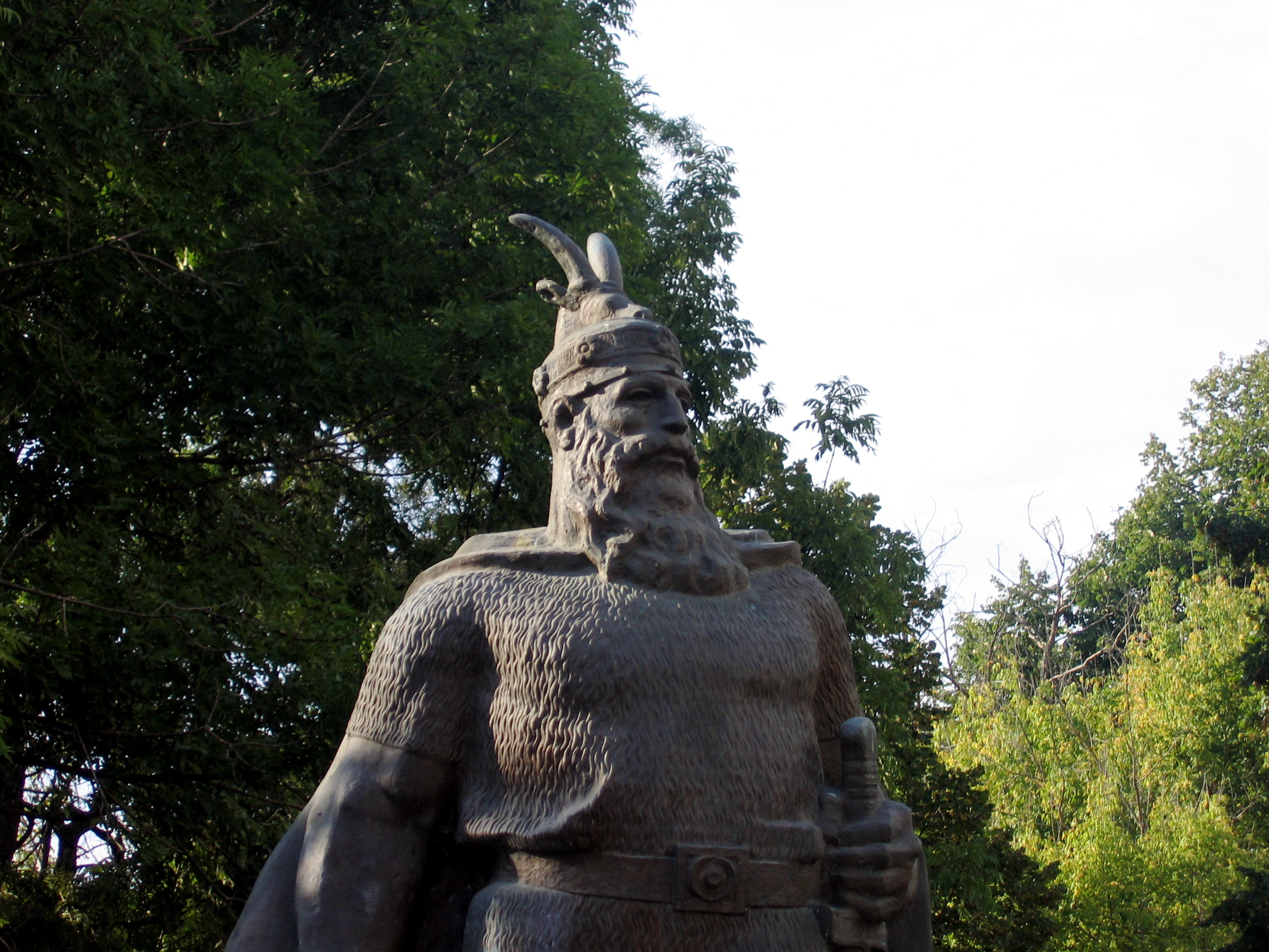 Паметник на Скендербей в Дебър, Република Македония.